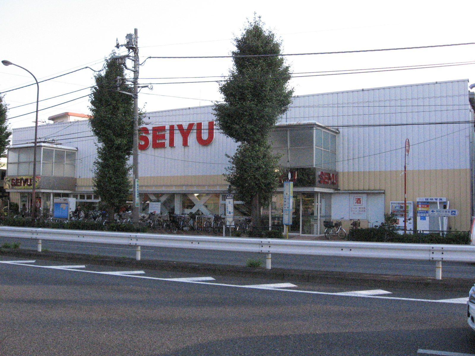 西友関町店（東京都練馬区）